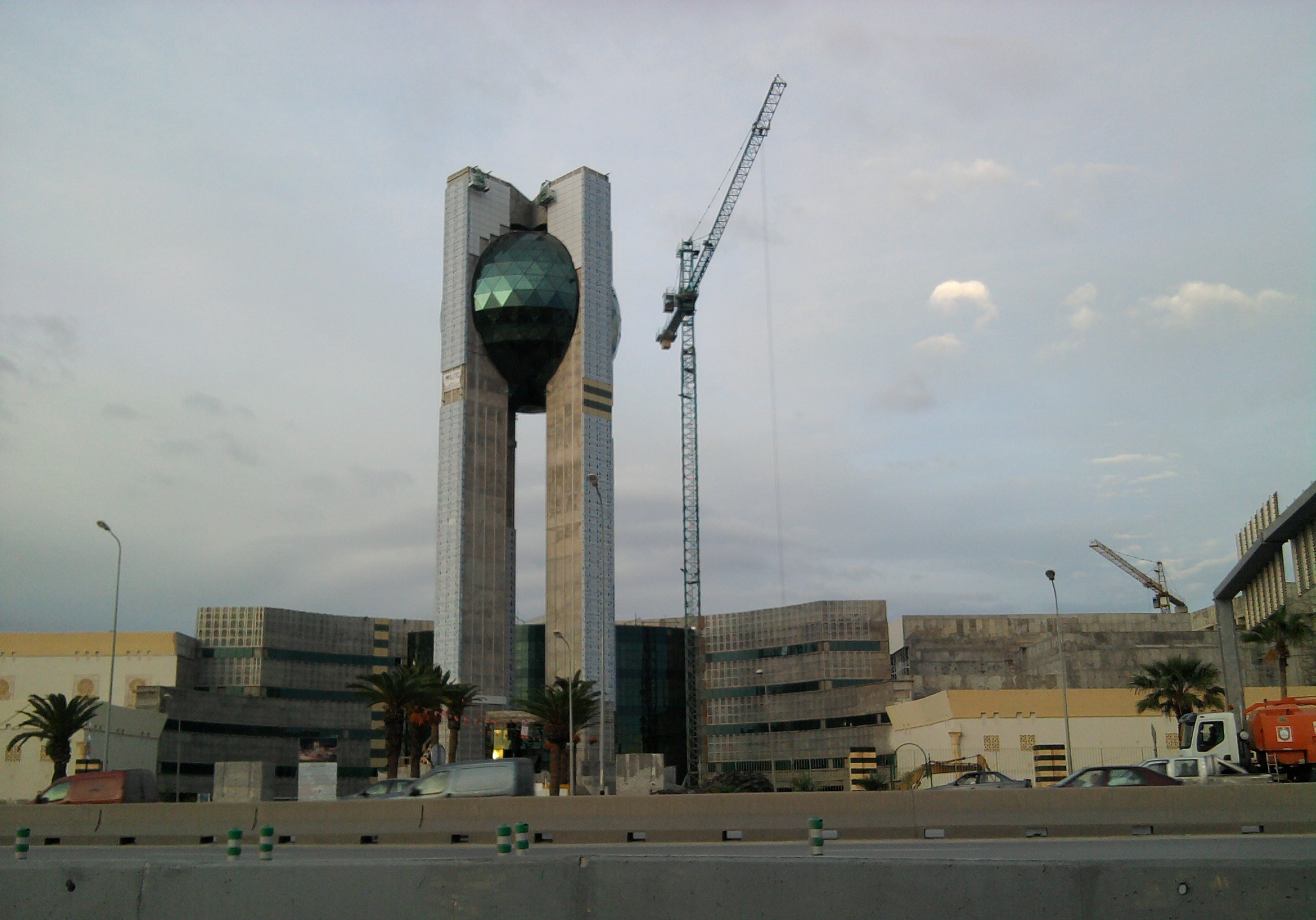 Tunisie, cité de la culture en construction